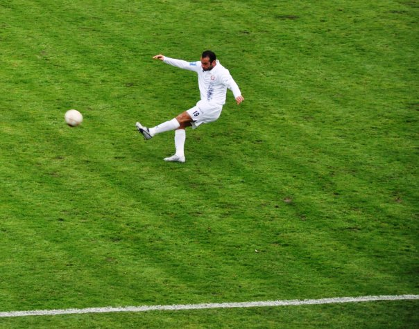 Егише Меликян — армянский футболист.